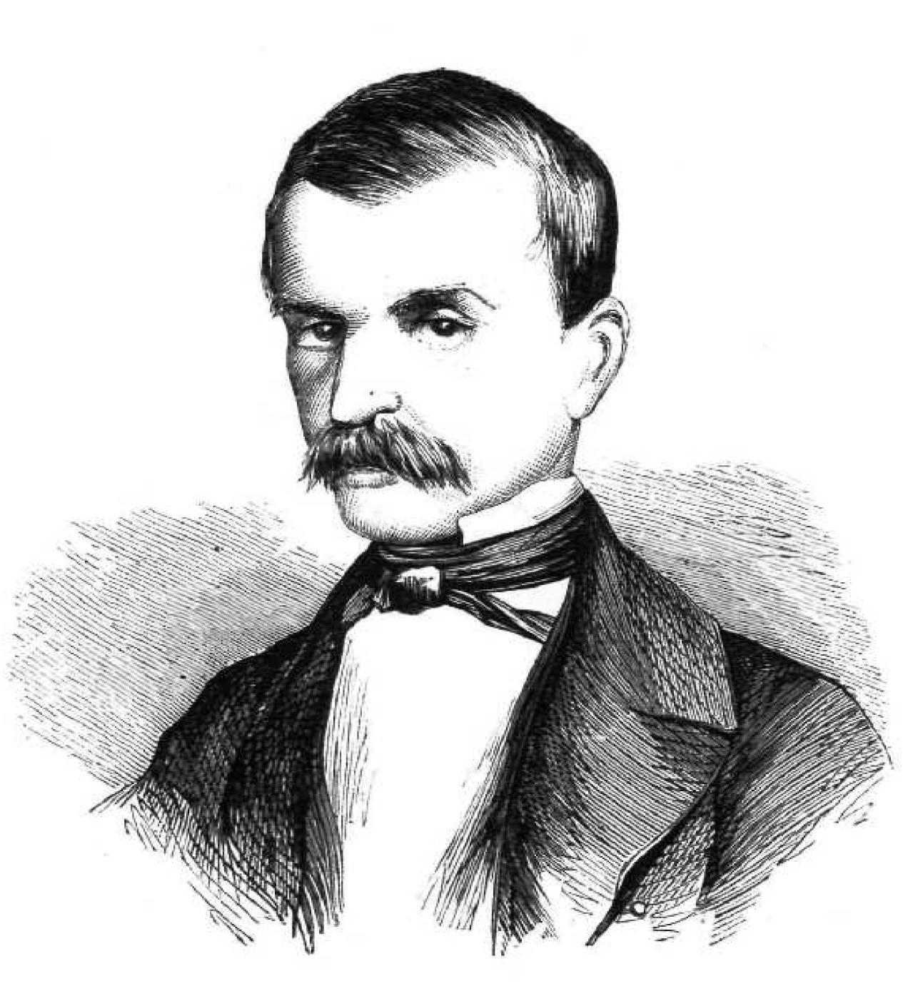 Griechischer Politiker, 19. Jahrhundert